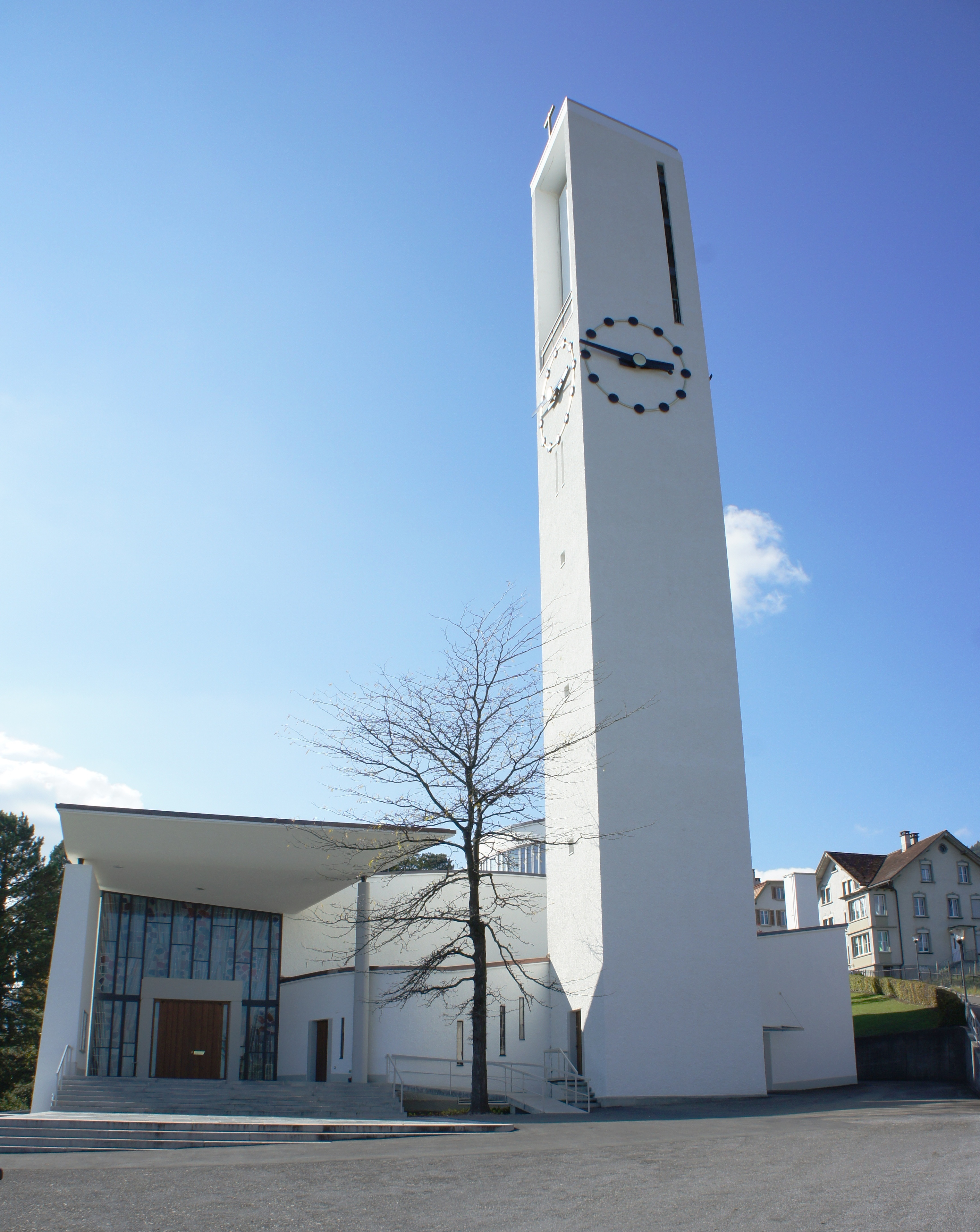 Die kath. Kirche Rebstein aus Osten. Links zum überdachten Haupteingang führen sowohl Stufen als auch eine rollstuhlgängige Rampe. Im mittleren Bildteil steht der Kirchturm mit Turmuhren und Aussichtsplattform auf Höhe des Glockenstuhls. Rechts vom Turm ist die Sakristei. Am rechten Bildrand ist der Burgweg, der zum Friedhof hinauf führt, zu erkennen.